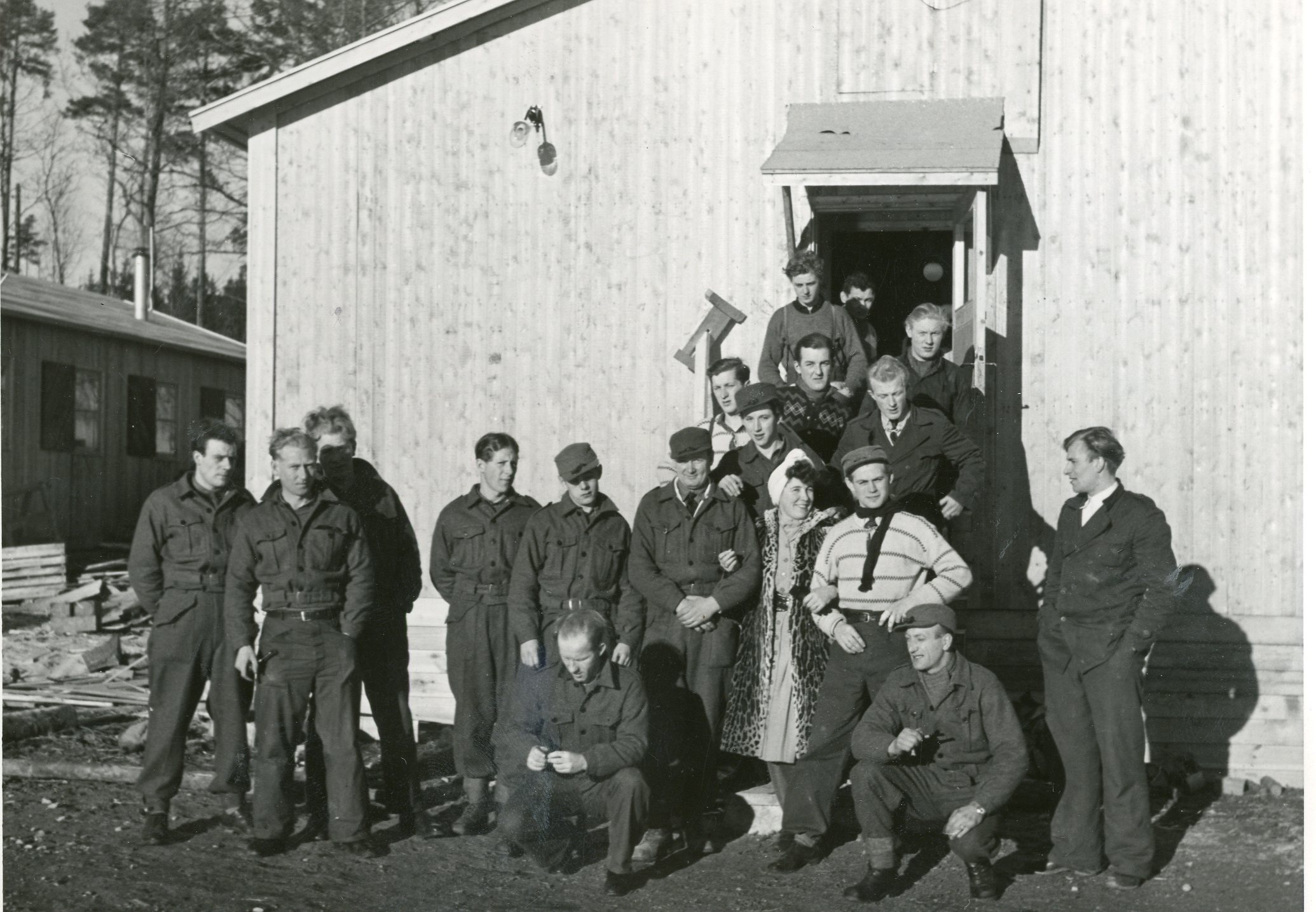 NORDMENN I SVERIGE VENDER HJEM. I 1942 begynte Den norske regjering i samarbeide med svenske myndigheter utdannelsen av 8-9000 yngre norske flyktninger i Sverige til politiavdelinger. Disse politistyrkene er beregnet på å ta over polititjenesten og opprettholde ro og orden i de befridde områder av Norge. Under forhandlingene i Stockholm mellom den norske utenriksminister Trygve Lie og justisminister Terje Wold på den ene siden og Den svenske regjering på den annen, er det i disse dager oppnådd enighet bruken av disse politistyrkene. Ifølge overenskomsten vil et antall norske politifolk reise til Nord-Norge snarest mulig og tjenestegjøre i de områder som er og etter hvert vil bli befridd av russiske og norske tropper. Mälsåker slott ved Mälaren er en av de forlegninger i Sverige hvor norsk reservepoliti utdannes. Bildet viser noen av mannskapene utenfor sin brakke. RA/PA-1209/Uc/67/3/S5052